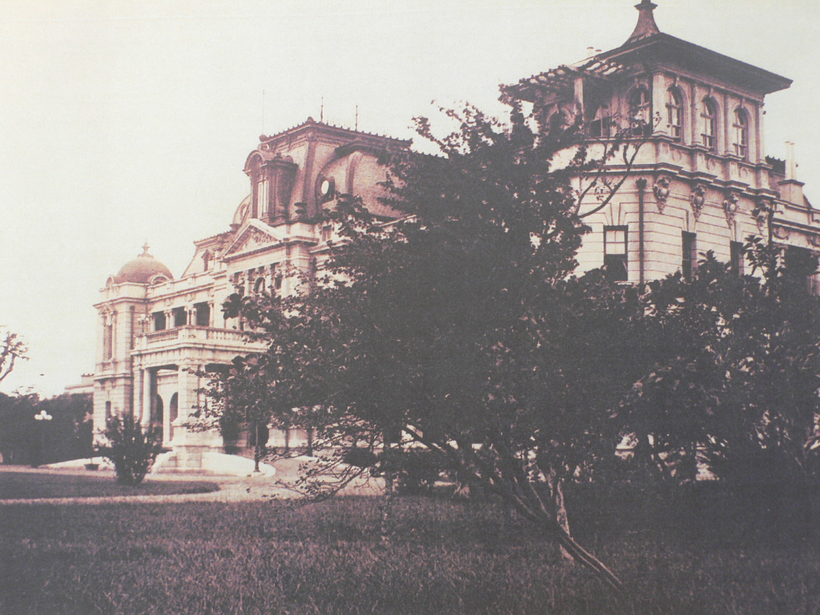 1913年改建完成後的臺灣總督官邸，1919年所攝。Bân-lâm-gú: 1913-nî kái-kiàn uân-sîng āu ê Tâi-uân Tsóng-tok kuann-tí, 1919-nî sóo liap. 1913年改建完成後的臺灣總督官邸，1919年所攝。